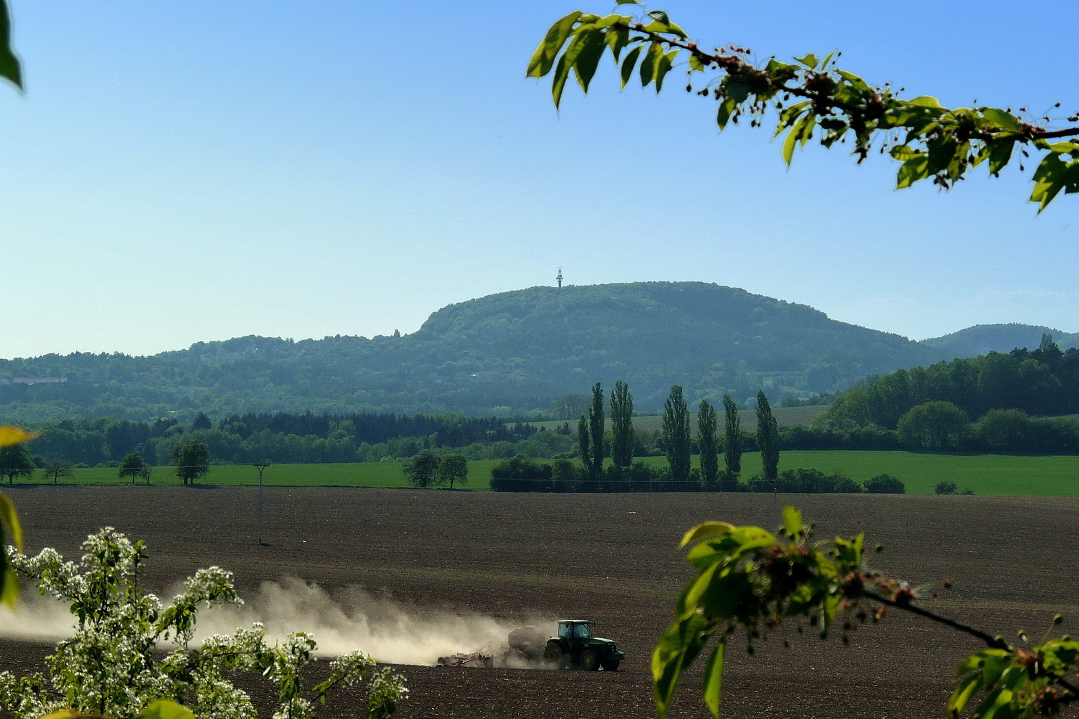 Vrátenská hora a orba z Komošína